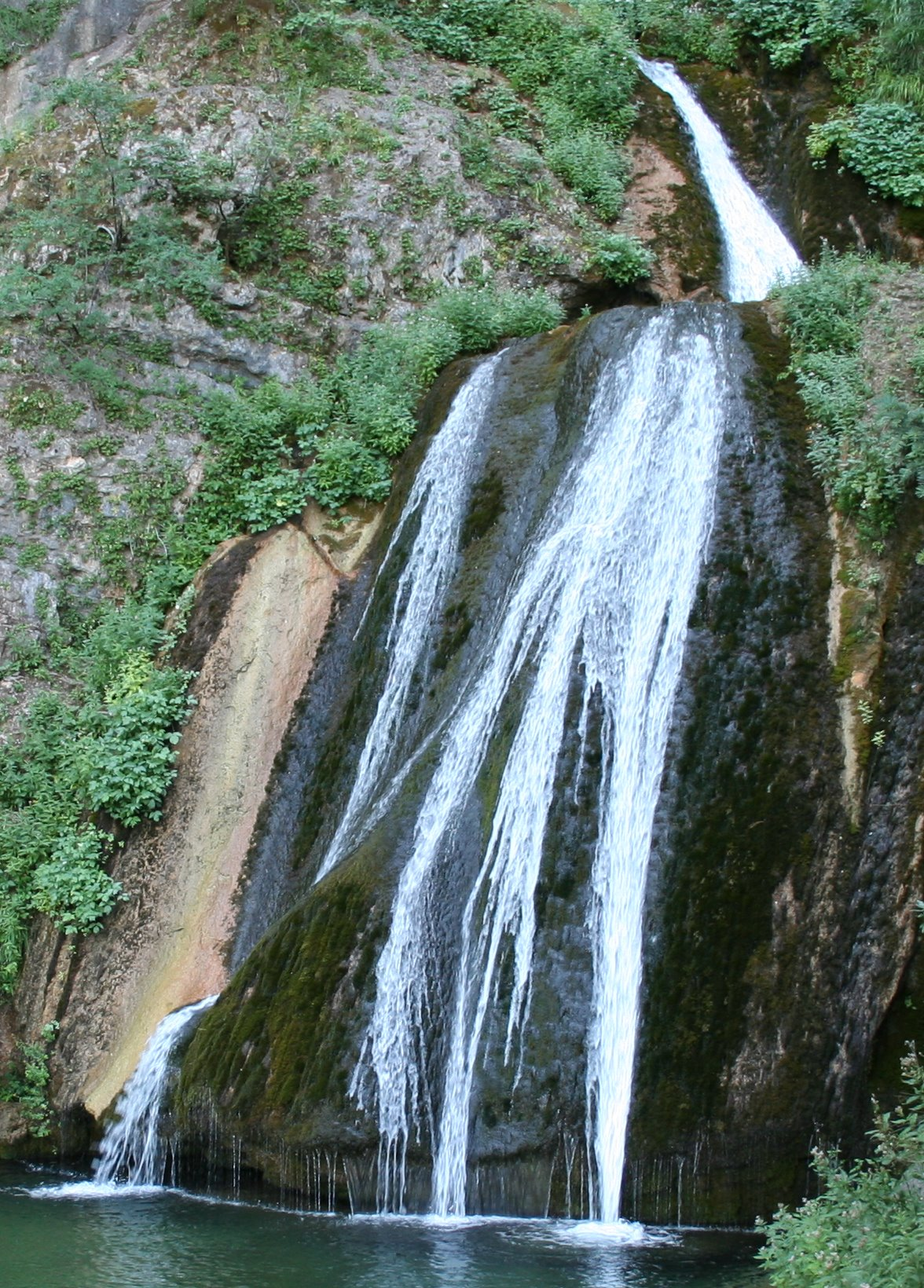 Nacimiento del Río Mundo, Molinicos, Provincia de Albacete. España.